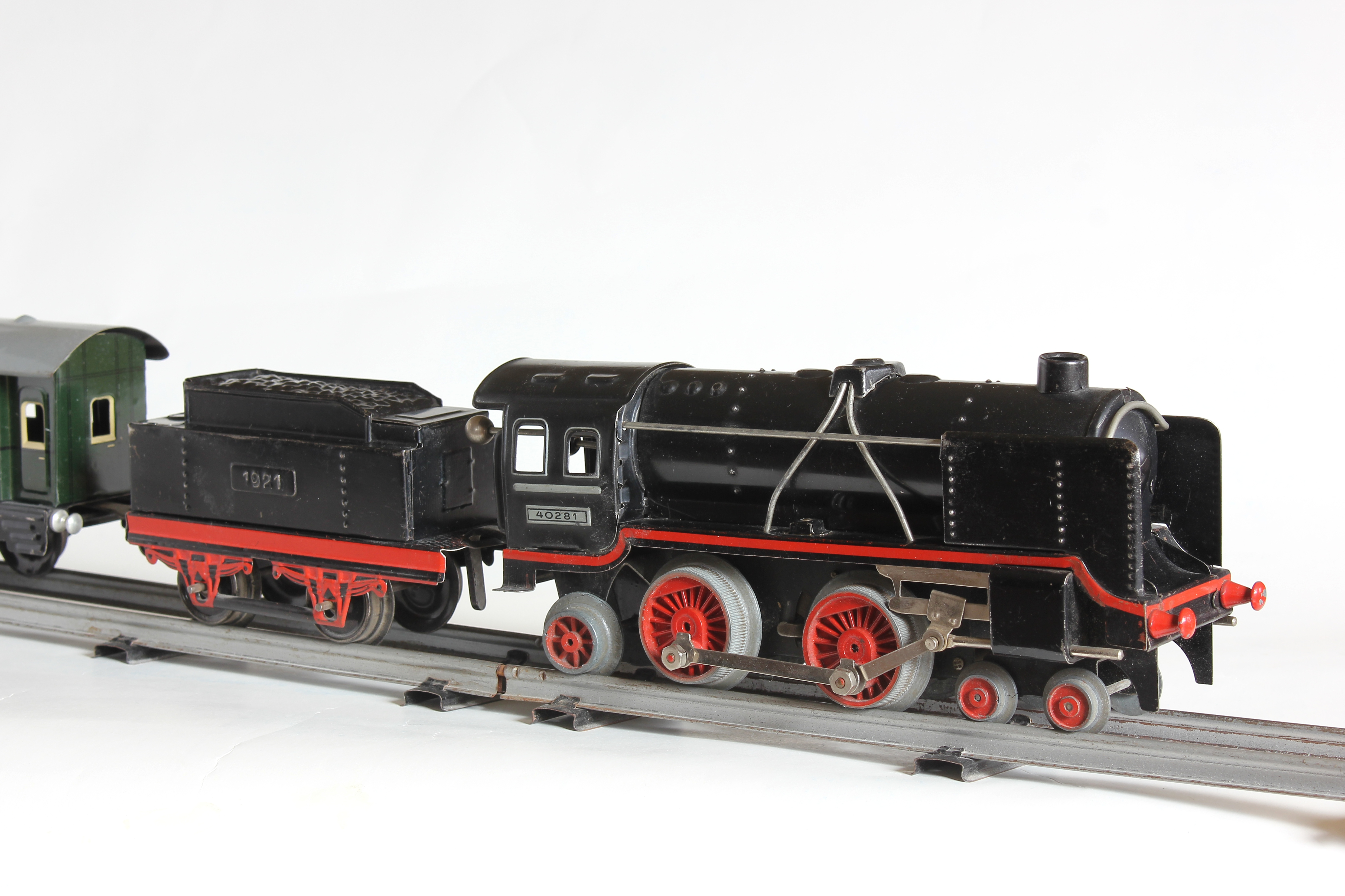 Blechspielzeug-Lokomotive mit Uhrwerk, Spur 0, um 1950; Hersteller: Distler